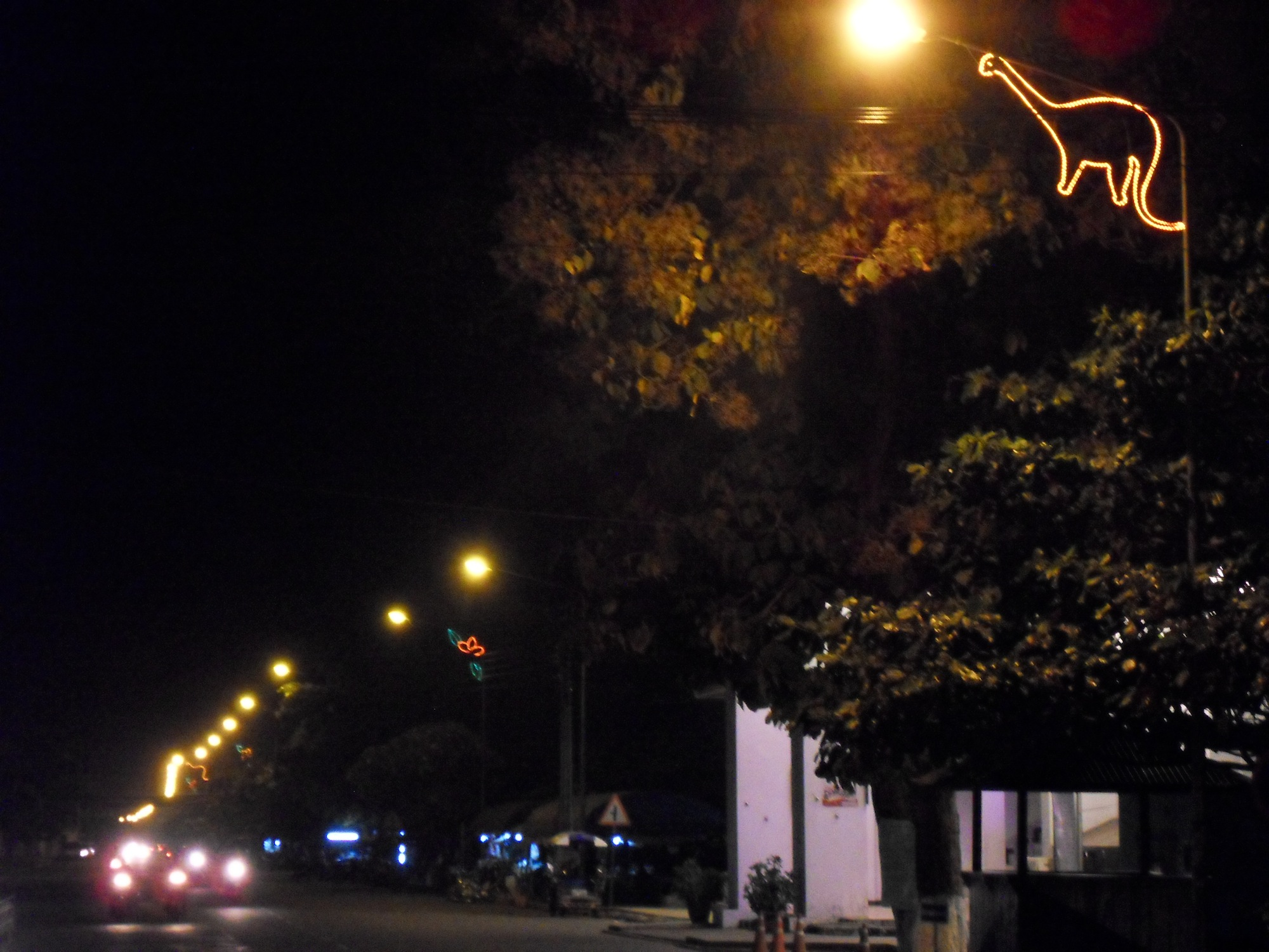 Savannakhet by night : Tangvayosaurus est partout. (Le Mékong est à droite) Unknown